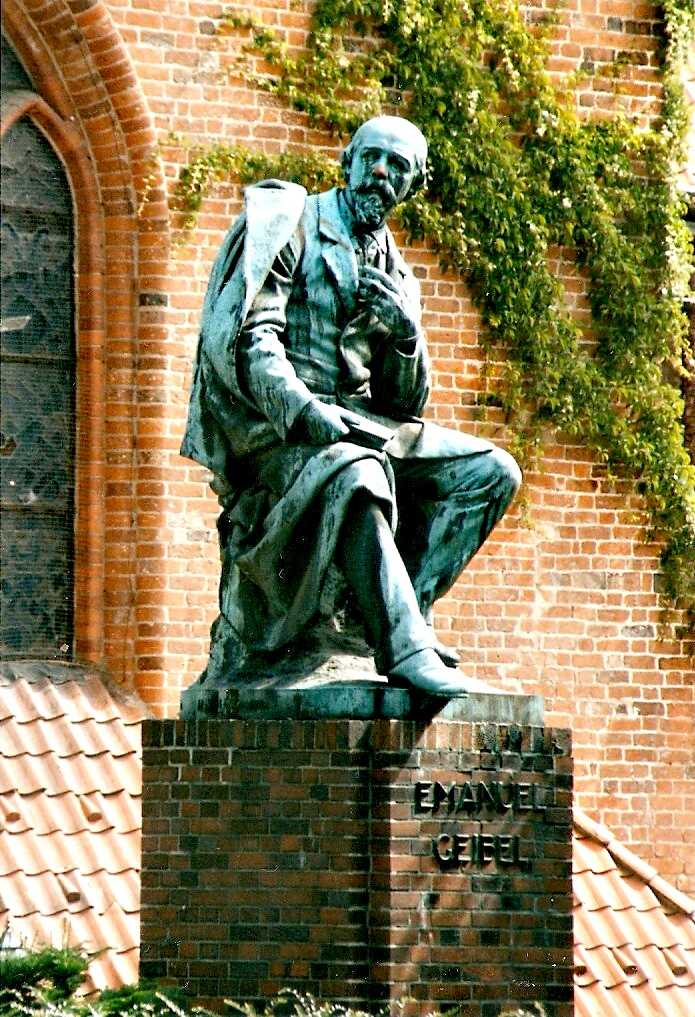 Lübeck Koberg einst Geibel-Platz; Statur Emanuel GeibelThis is a photograph of an architectural monument.It is on the list of cultural monuments of Lübeck